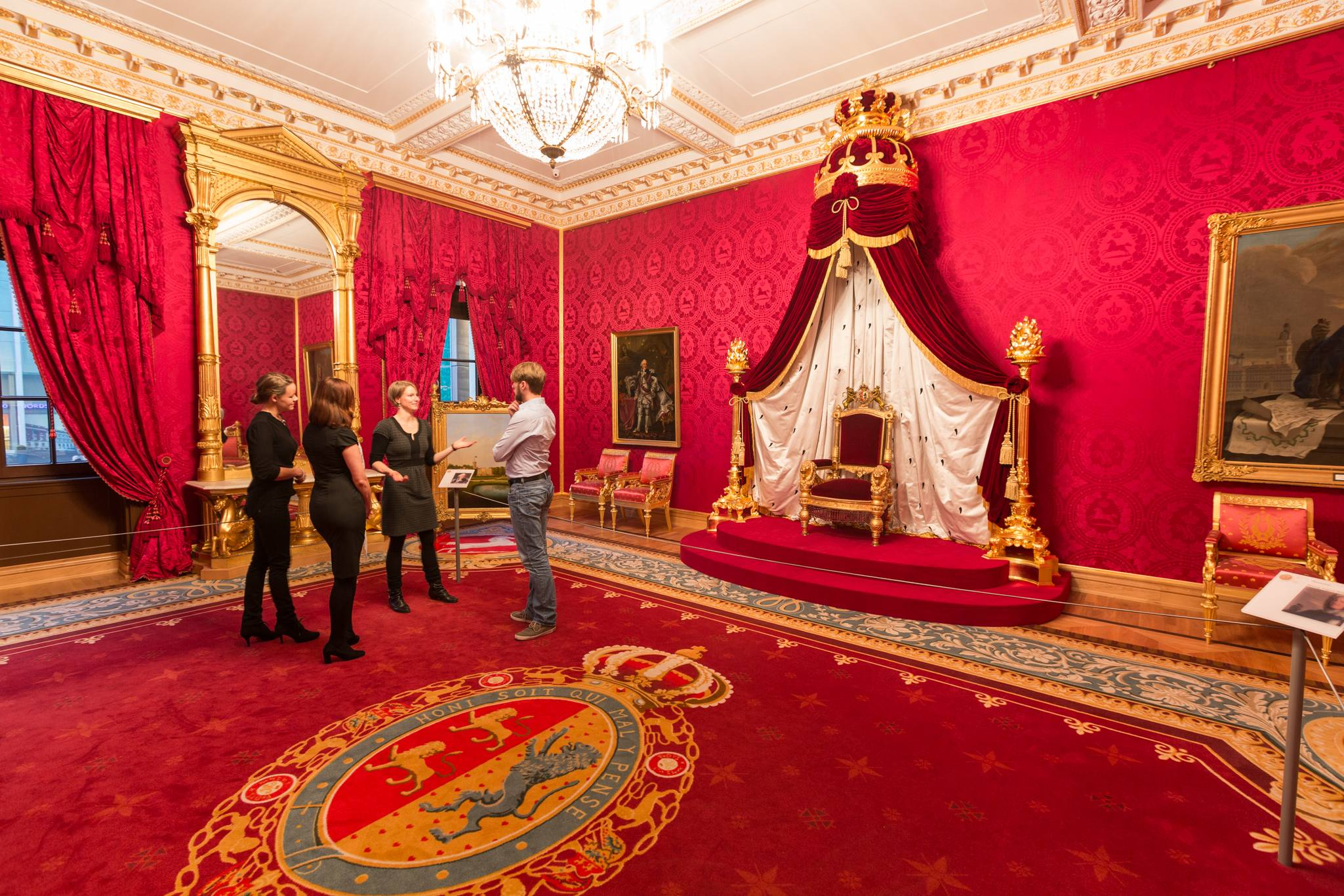 Das Bild zeigt den Thronsaal im Schlossmuseum Braunschweig.